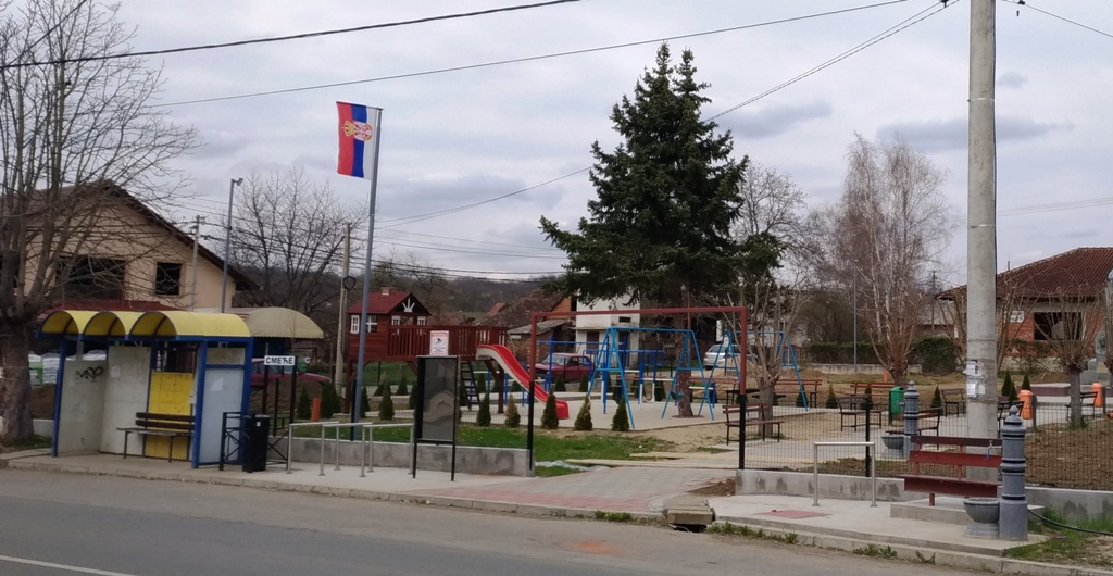 Srpski (latinica): Centar Medvedje u podne. Glavna ulica.